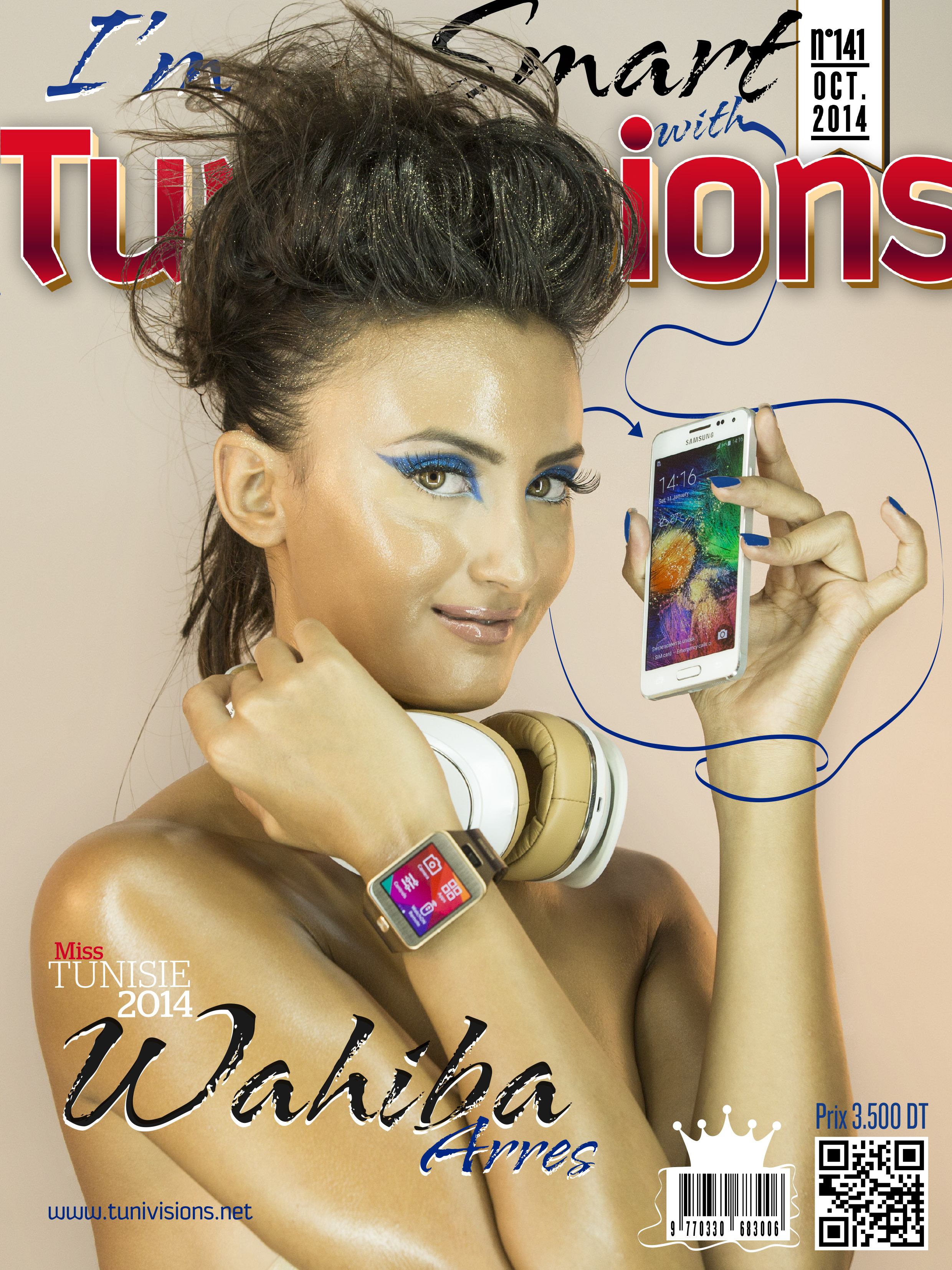 Couverture du numéro 141 du magazine tunisien Tunivisions.